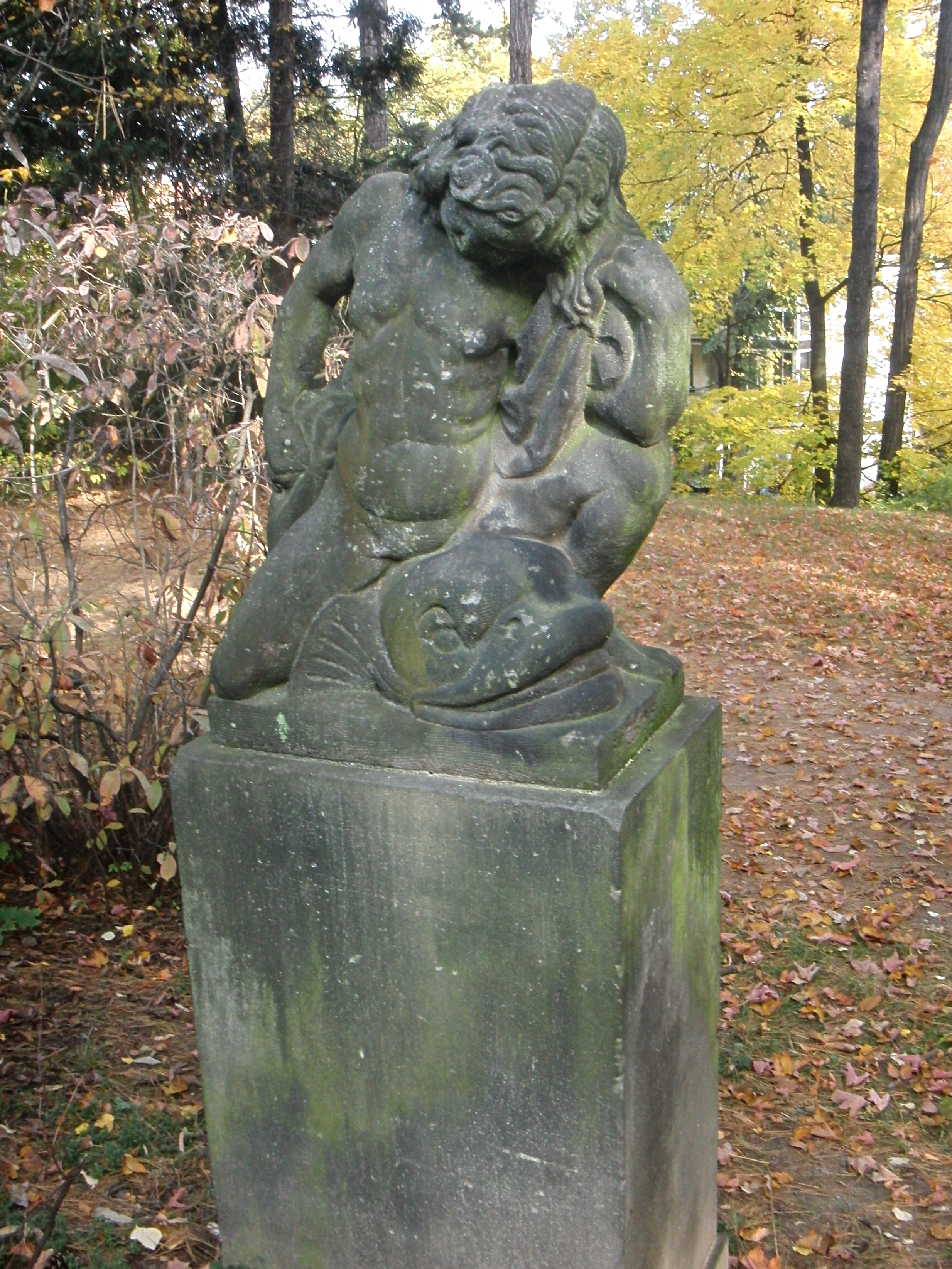 Weschke, Franz – 1930 , Kinderfigurengruppe "Kind mit Delphin" im Westendpark Dresden, 1937 in Fichtepark umbenannt.